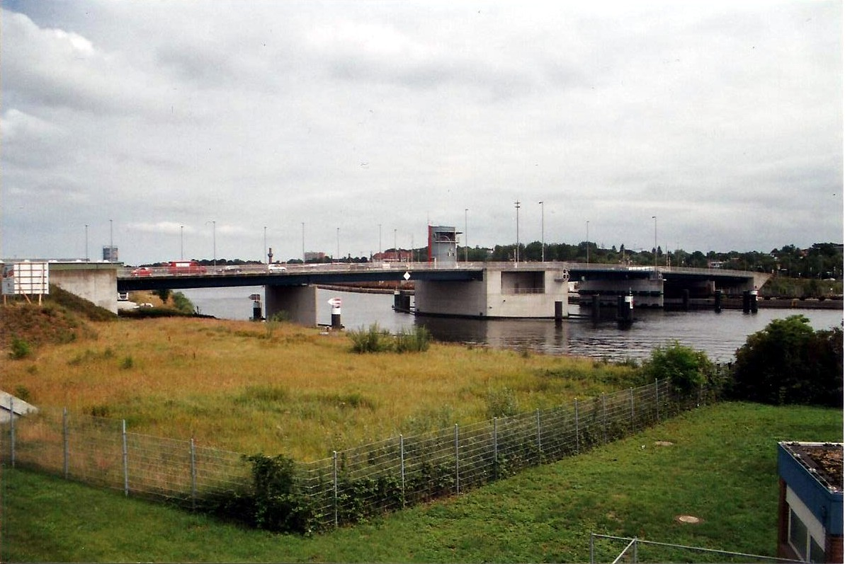 Die Erich-Warburg-Brücke ist mit zusätzlichen Beleuchtungskörpern ausgestattet worden